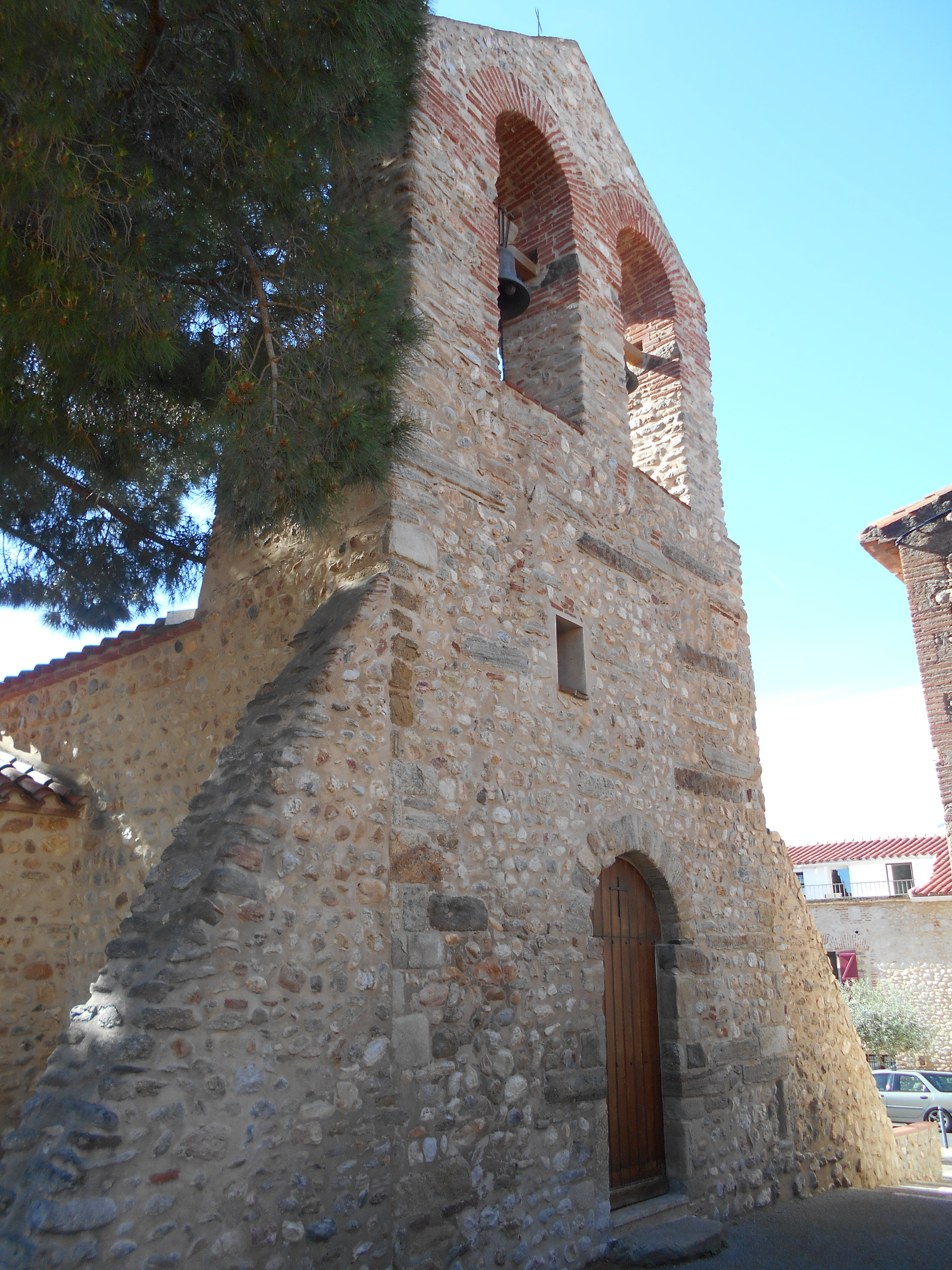 Unknown language: Façana occidental de Sant Joan Evangelista